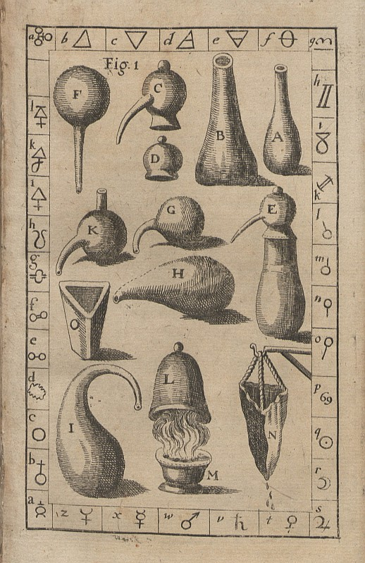 Original image description from the Deutsche Fotothek Alchemie & Chemie & Gefäß